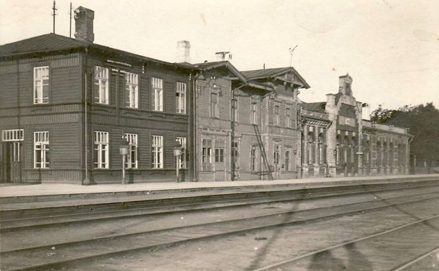 Двухэтажный деревянный корпус расширен почти в два раза. Одноэтажный деревянный флигель заменён новым каменным корпусом с залом ожидания, рестораном. 1918 год.